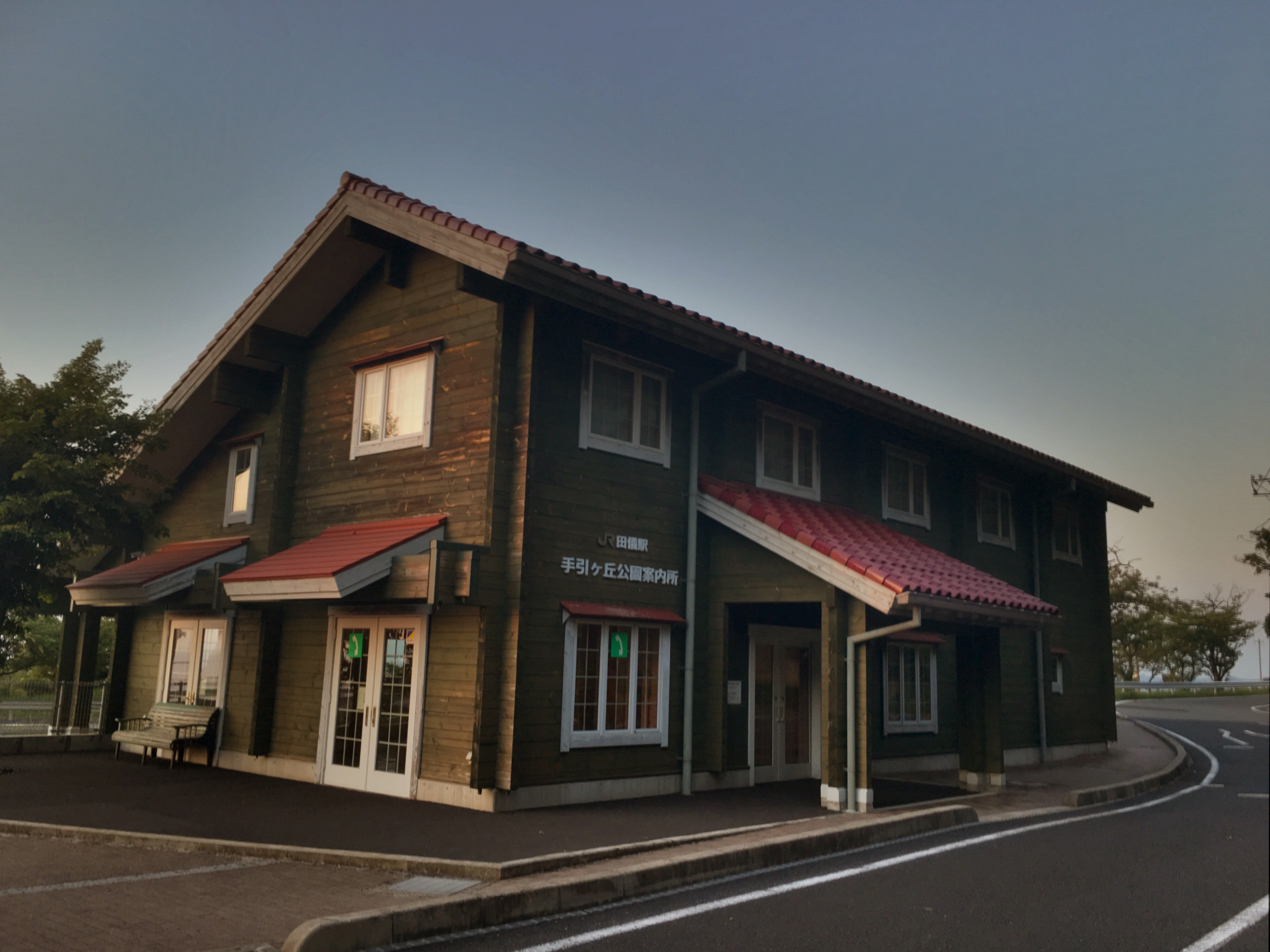 Tagi Station (田儀駅)